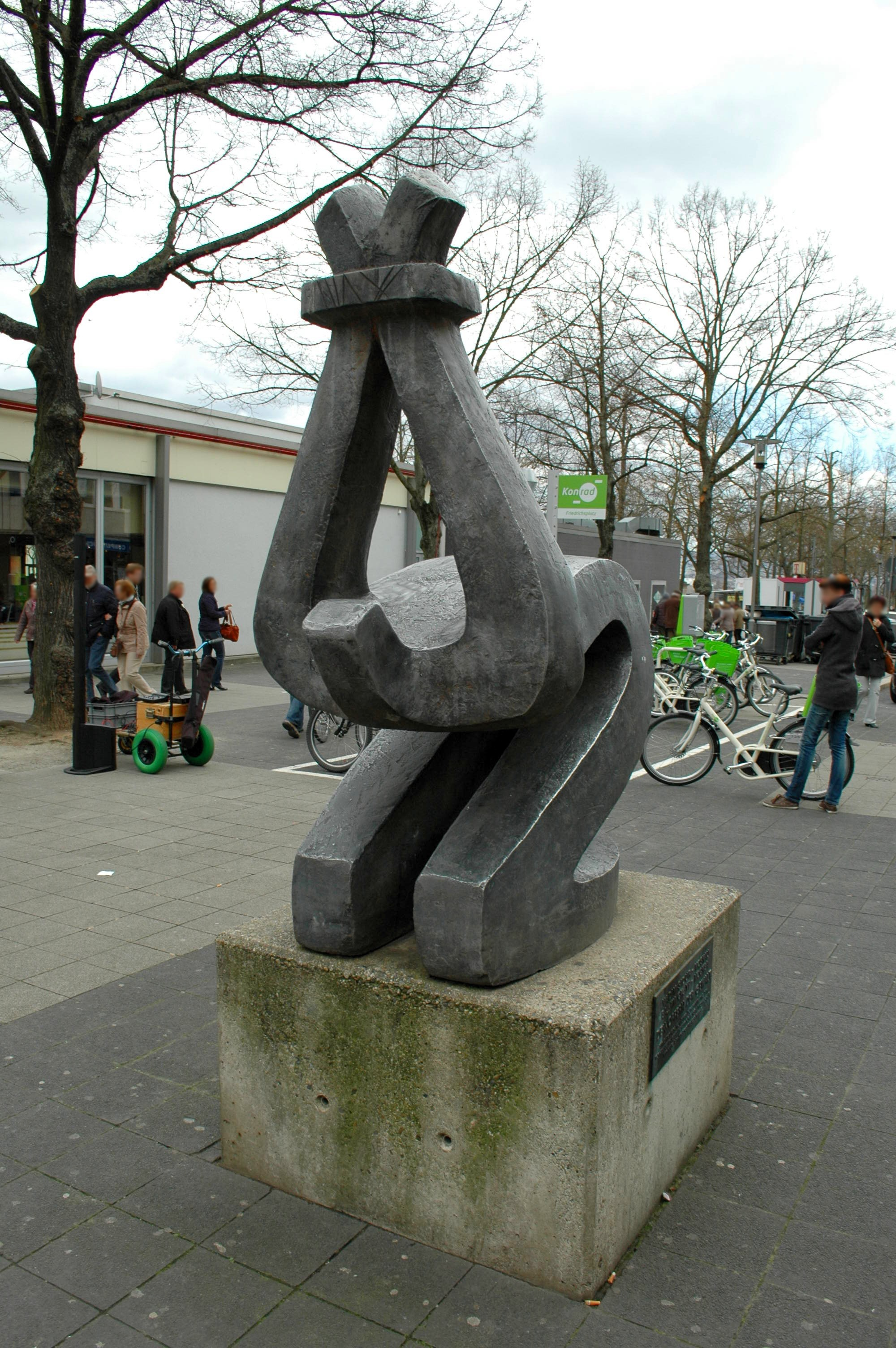 In der Innenstadt steht das Denkmal: Den Opfern der Gewalt von Vadim Sidur; Moskau.